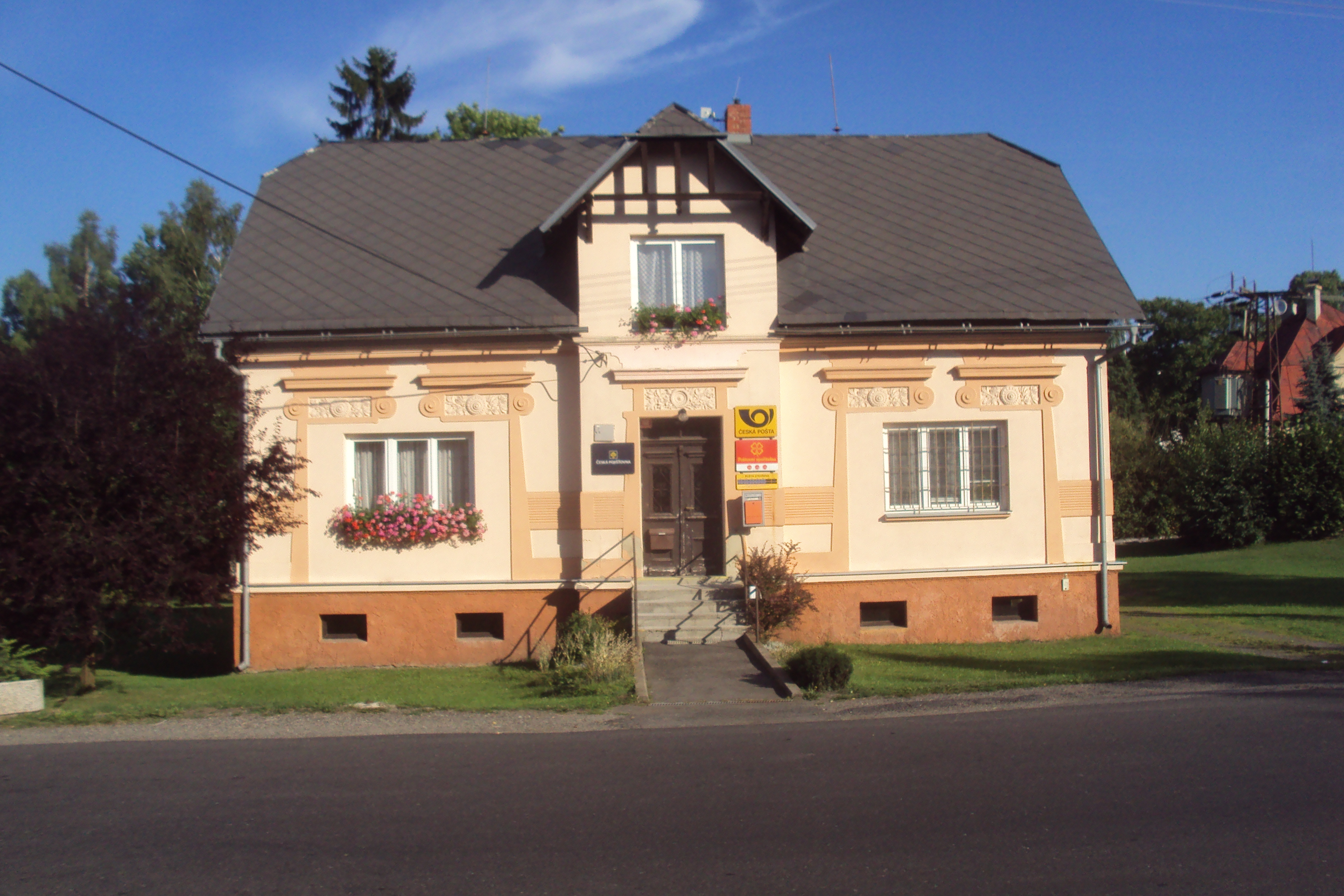 Pošta v Novém Oldřichově č.p. 158